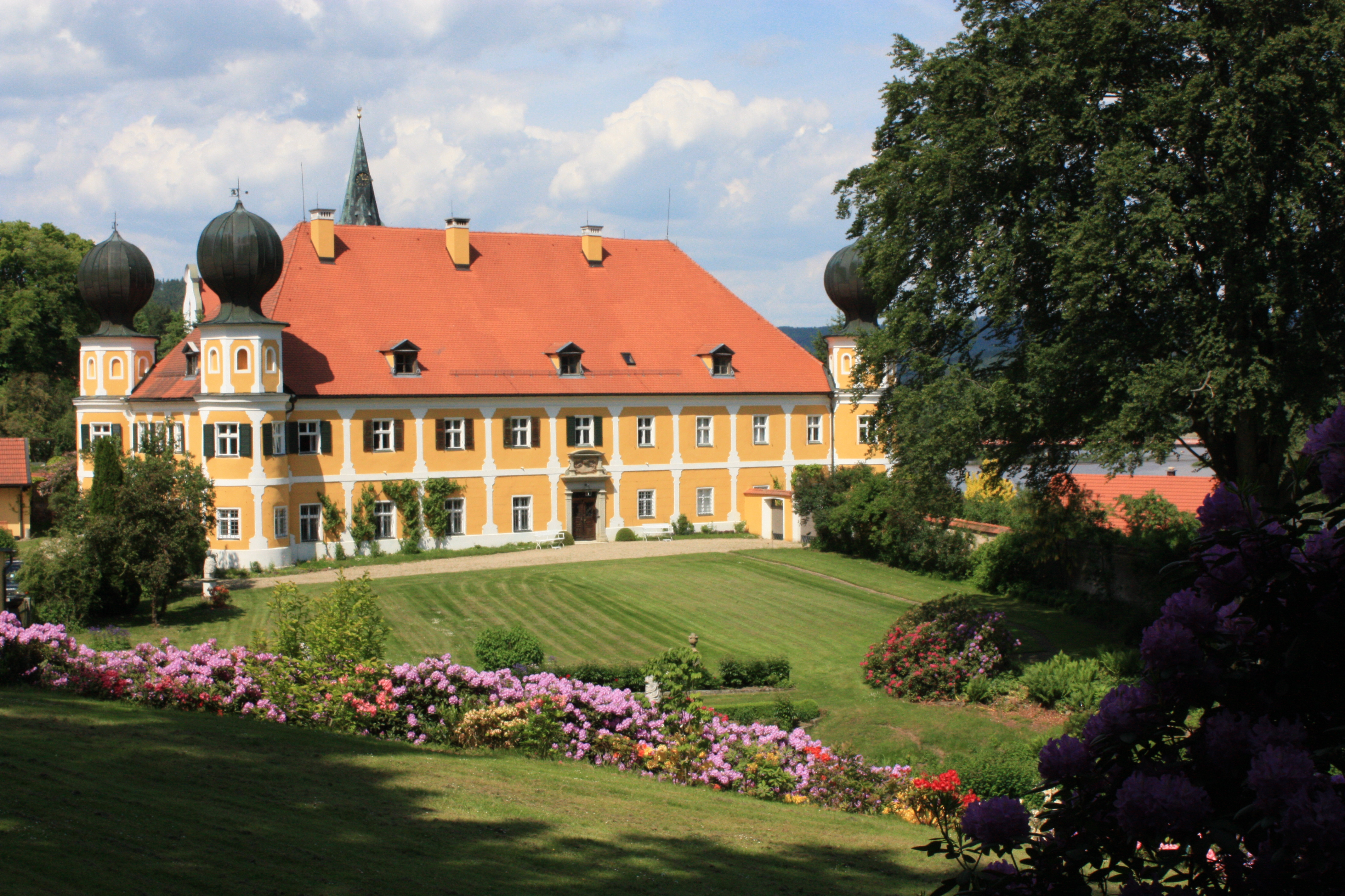 Schloss Ramspau im Mai 2009 während der Rhododendron-Blüte.